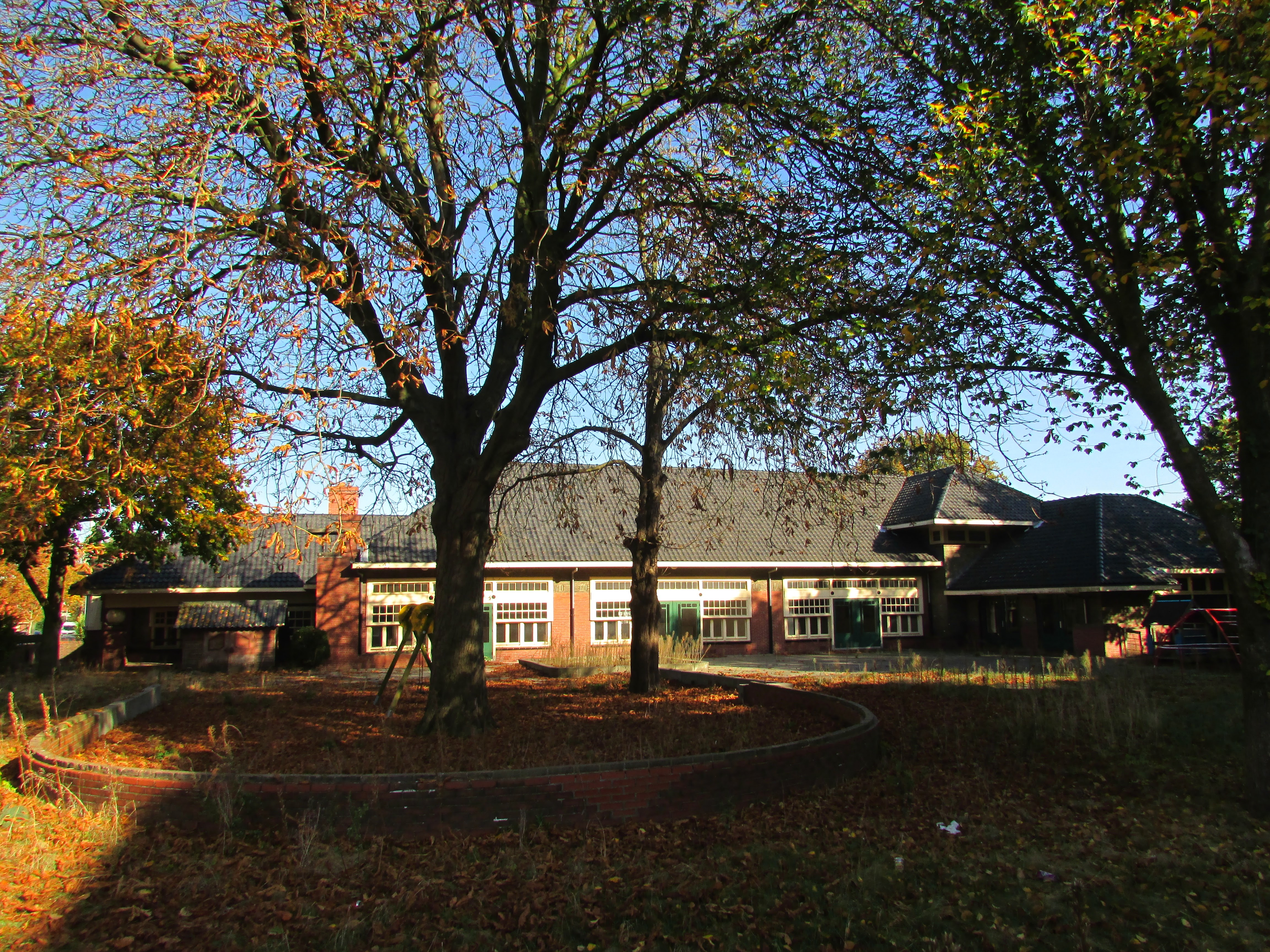 De in opdracht van het St. Anna´s Gesticht gebouwde R.K. school voor voorbereidend lager onderwijs is gesticht in 1928-1929. De ontwerper van het schoolgebouw was de Hilversumse architect Nic. Andriessen. De `St. Cuneraschool' is gebouwd in een voor de bouwtijd karakteristieke Interbellumstijl met invloed van het werk van Dudok en Frank Lloyd Wright. Het inwendige van de school is voor een belangrijk deel in de oorspronkelijke staat bewaard gebleven. De school wordt vanaf 2017 geheel gerenoveerd en zal een dependance worden van de Nassauschool.